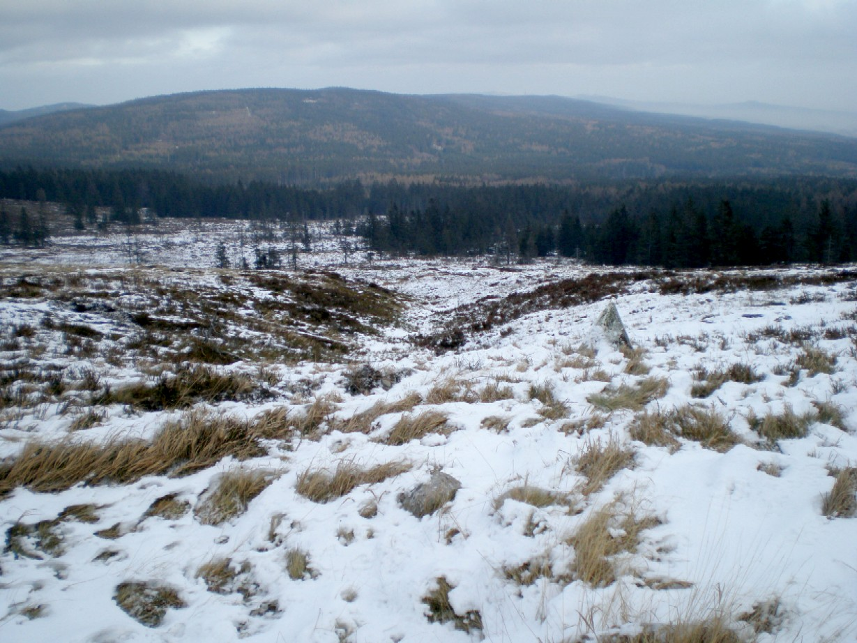 Vrchy Brda (773 m) a Sádka (709 m) z východního svahu Toku